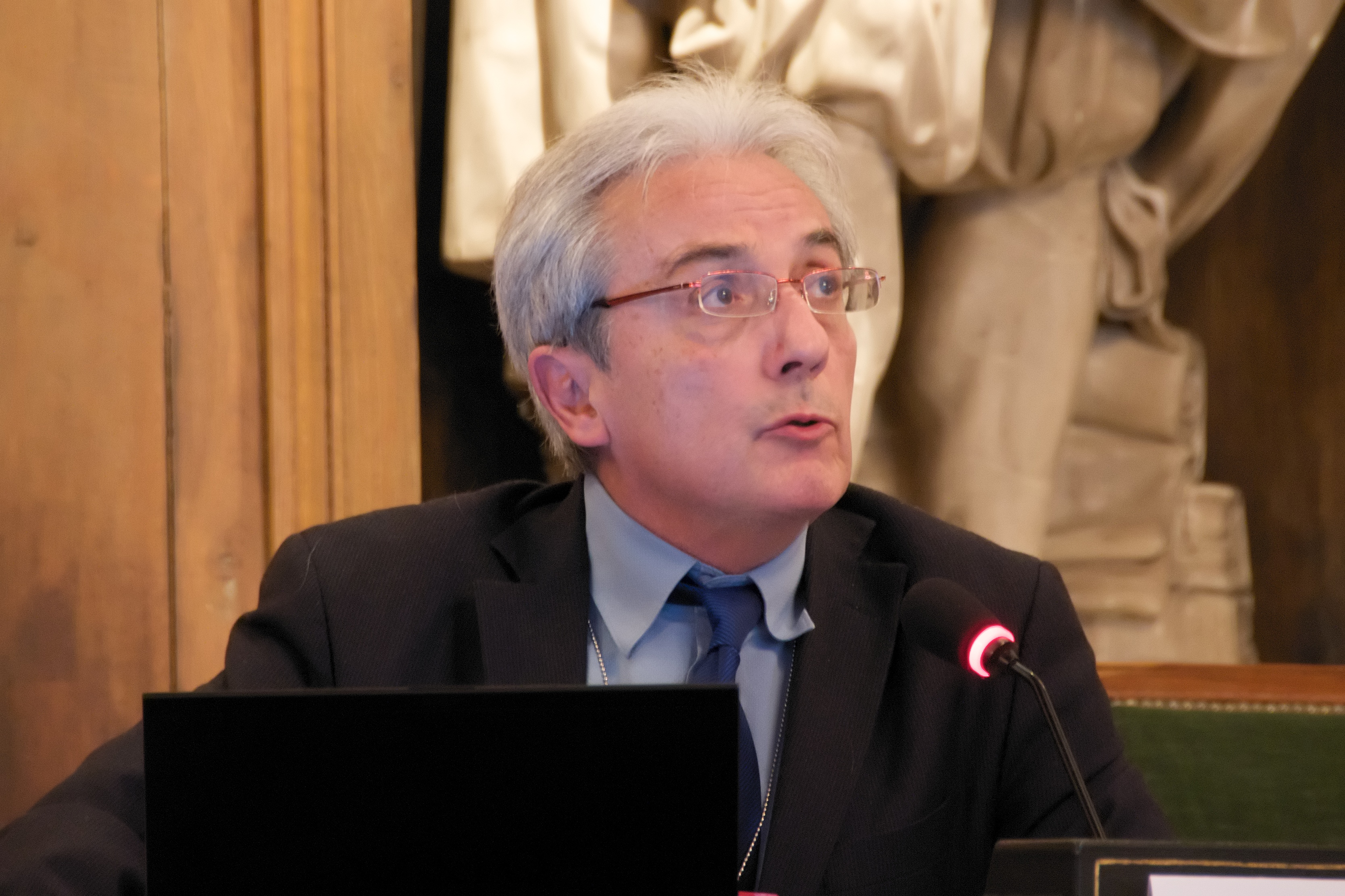 Le prix Nobel Albert Fert en janvier 2009. ClichÃ© personnel.